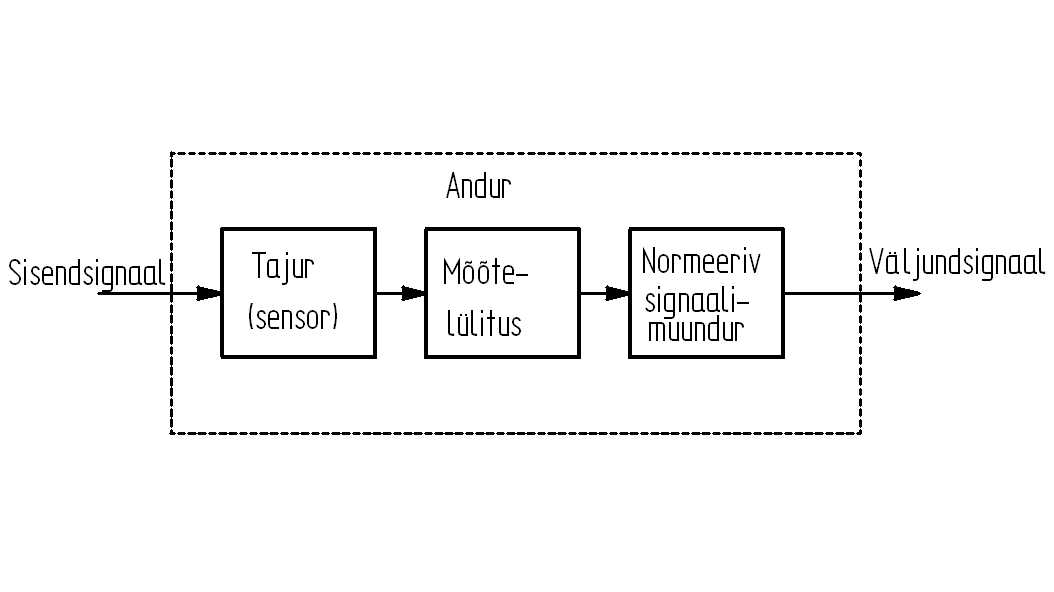 Anduri üldine plokkskeem